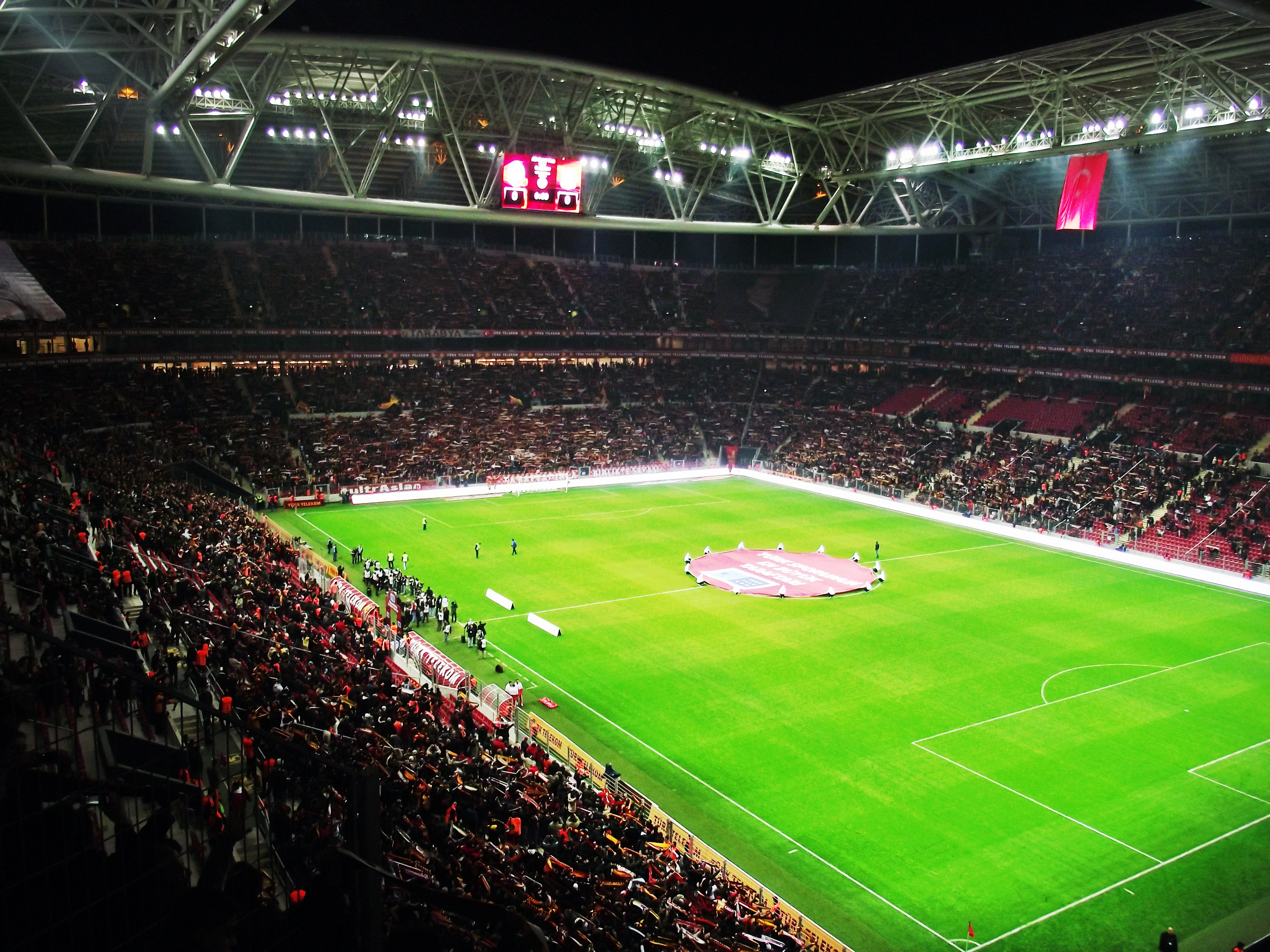 Aslantepe'de İlk Lig Maçı Öncesi Warchant (Atkı Şov)